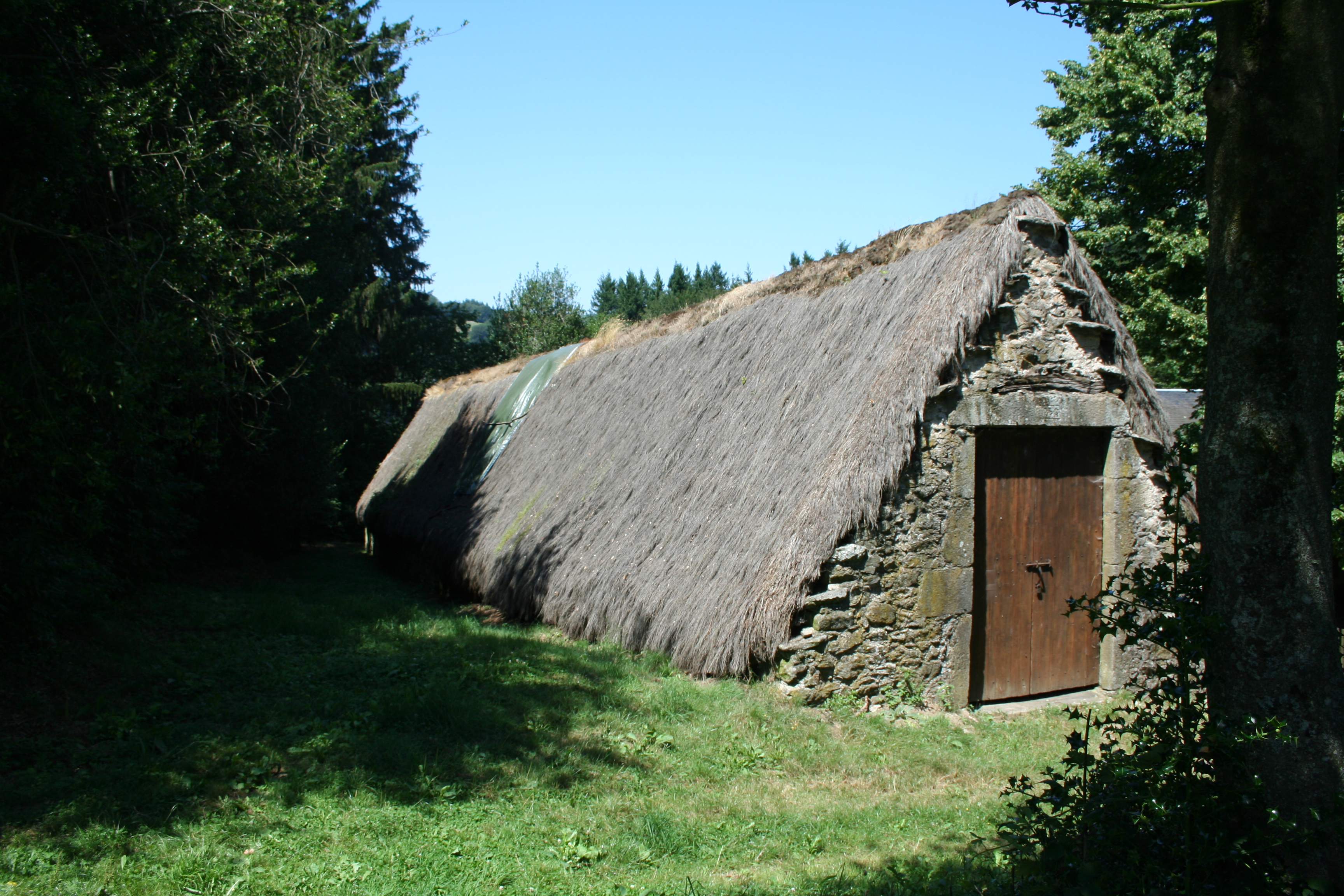 Fraisse-sur-Agout (Hérault) - Ferme de Prat Alaric avec son toit couvert de chaume de genêts (Cytisus scoparius).